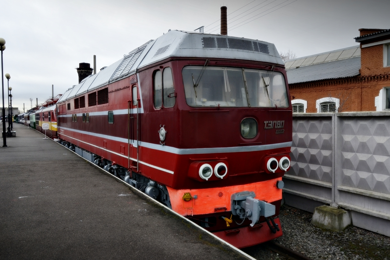 Музей ж/д транспорта